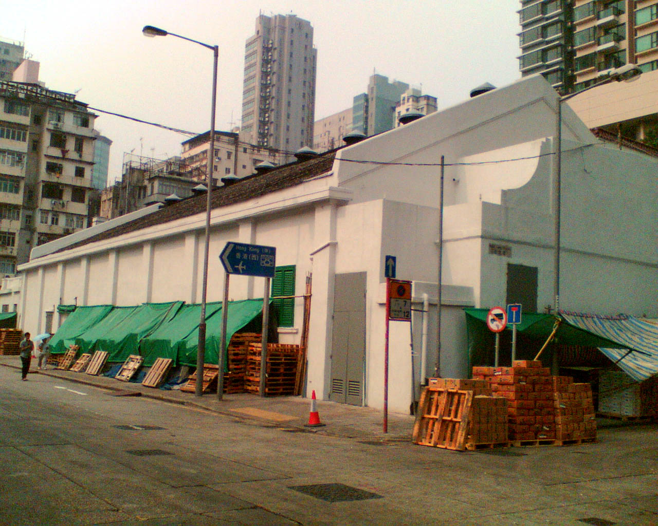 油麻地戲院近貌